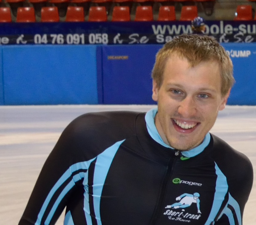 Sebastien Lepape durant les Championnats de France 2017 de Short-Track